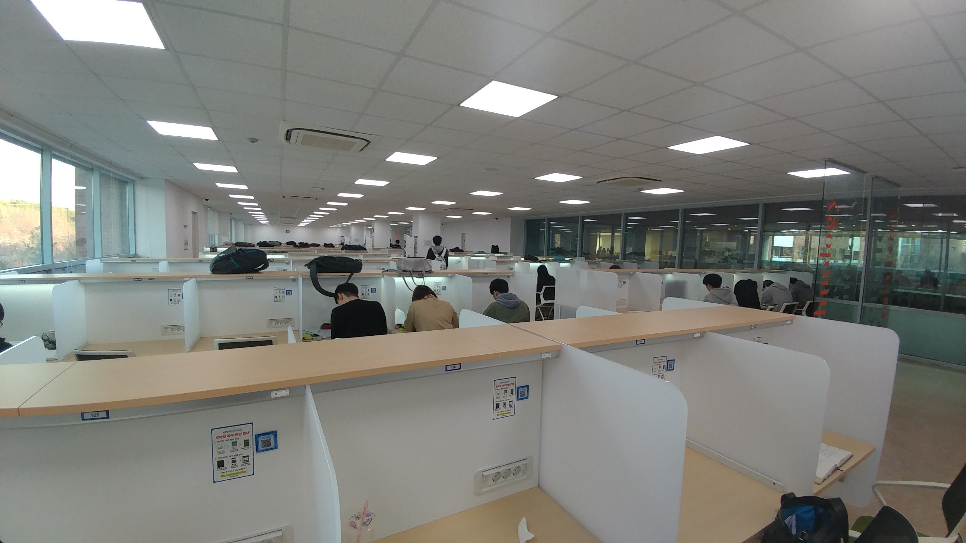 한국산업기술대학교 종합교육관의 열람실